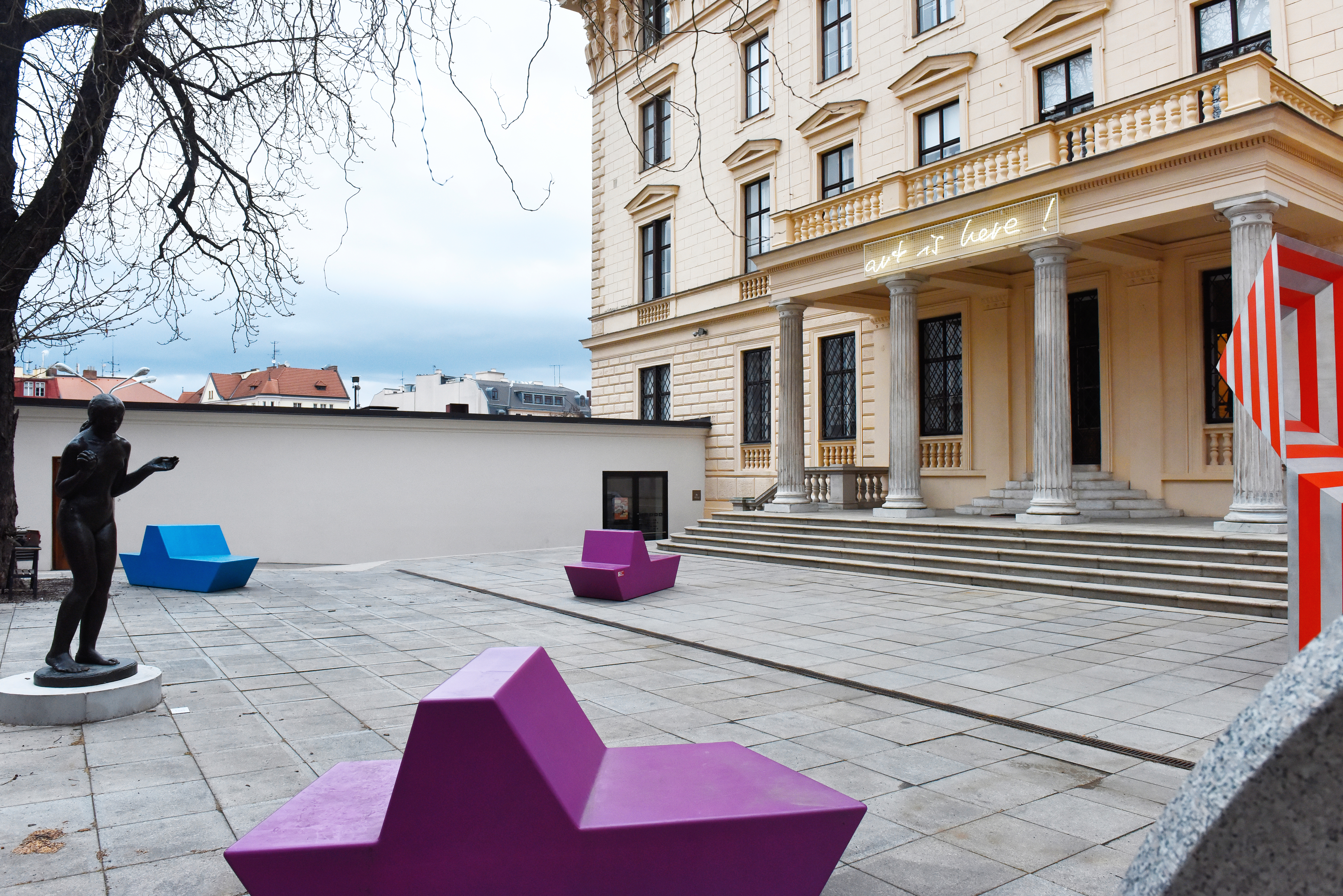 Pražákův palác - nádvoří